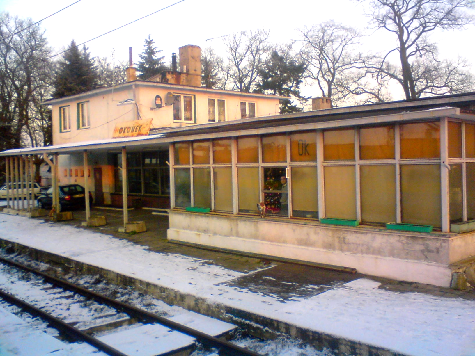 Stacja kolejowa w Okonku.